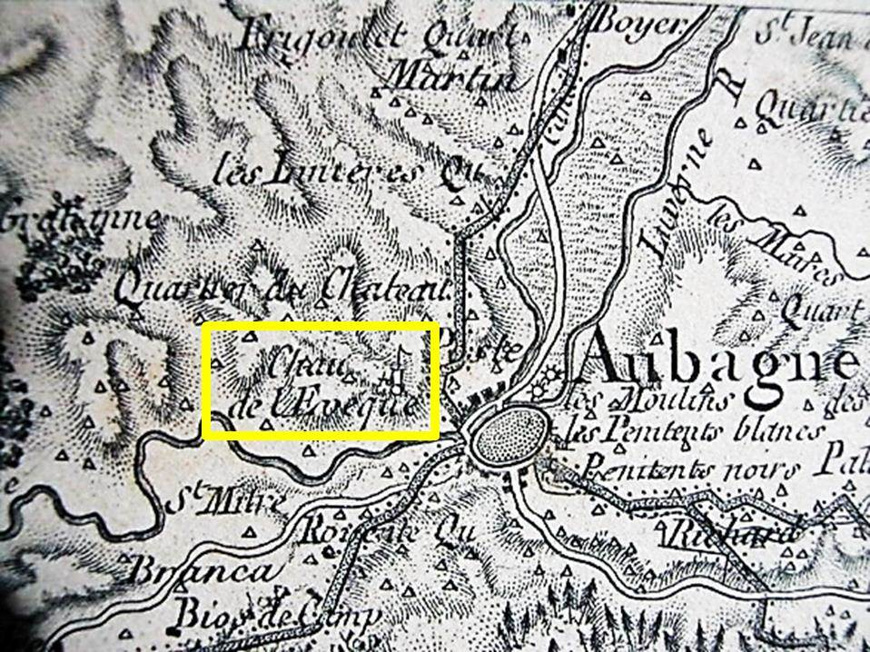 Carte d'Aubagne XVIIIéme siècle soulignant le "Chateau de l'évêque" au nord